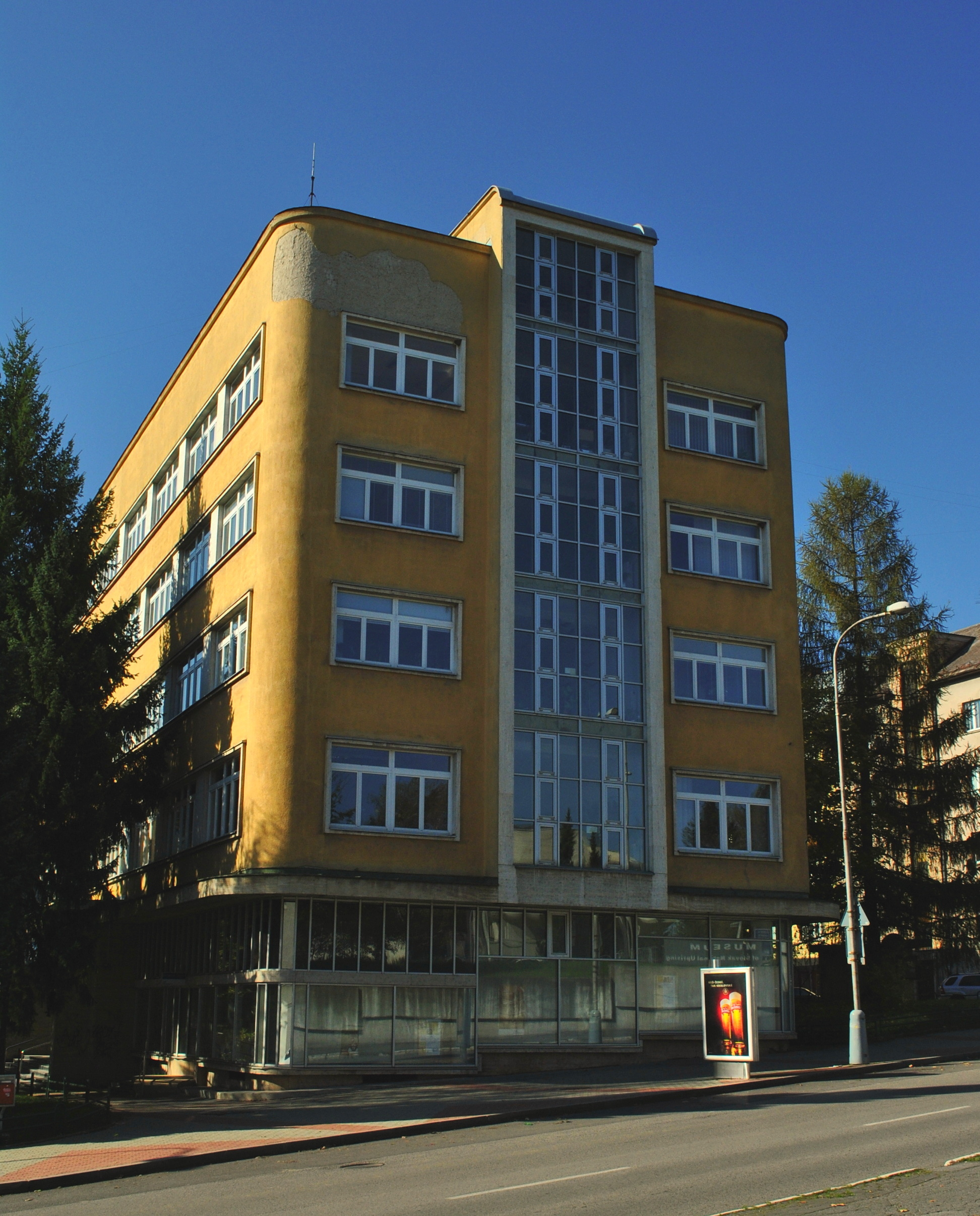 Budova administratívna pam.